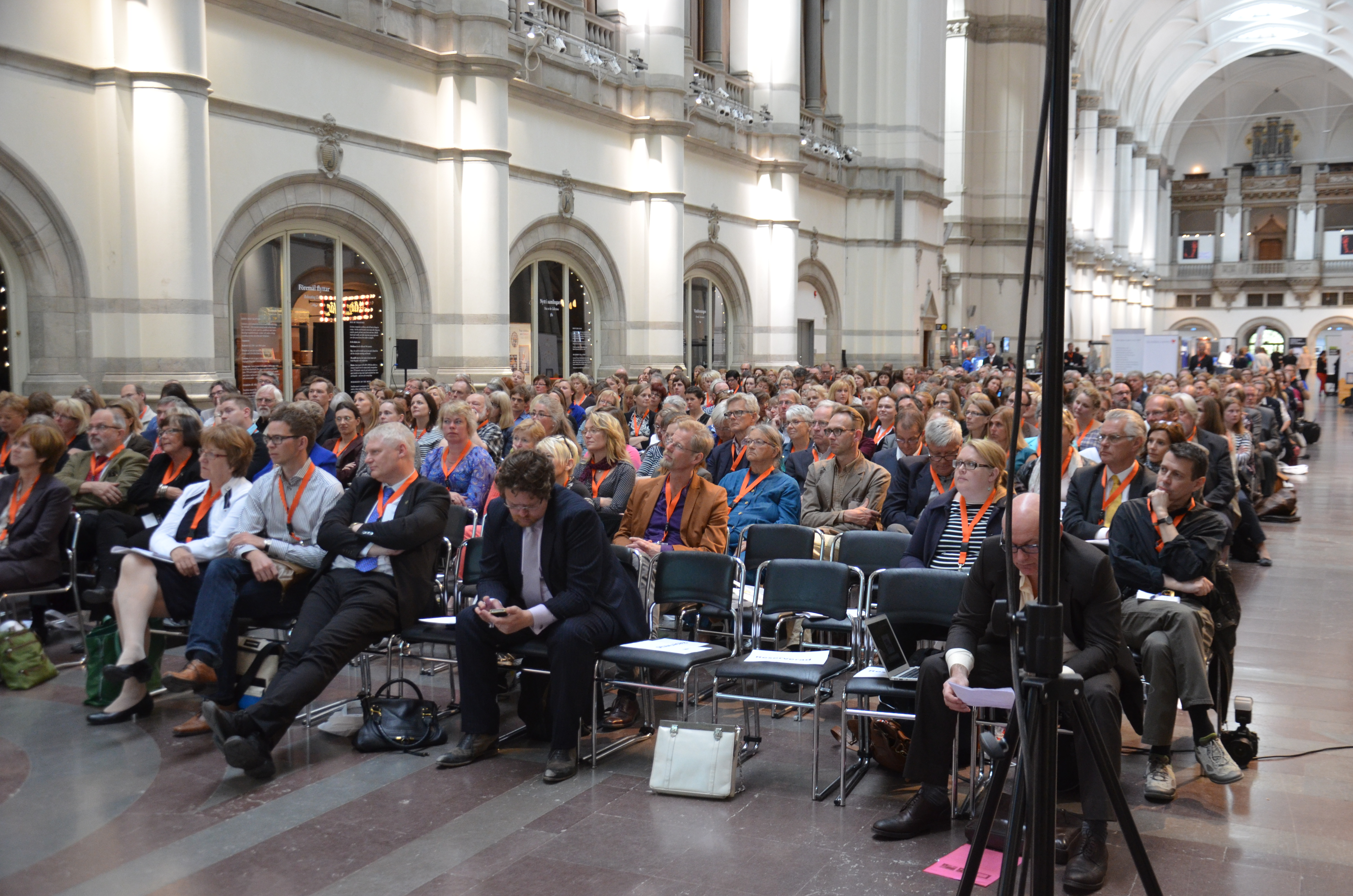 Annual conference of Riskförbundet Sveriges Museer (National Association of Museums of Sweden) at Nordiska museet in Stockholm, May 2013